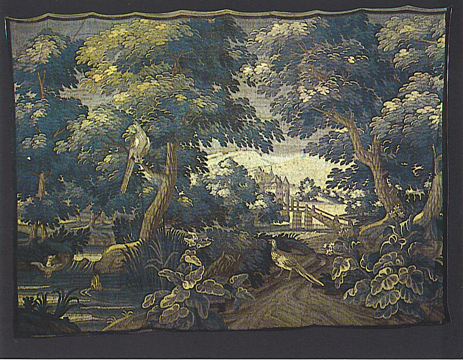 Een verdure met twee fazanten, Oudenaarde XVIIe eeuw